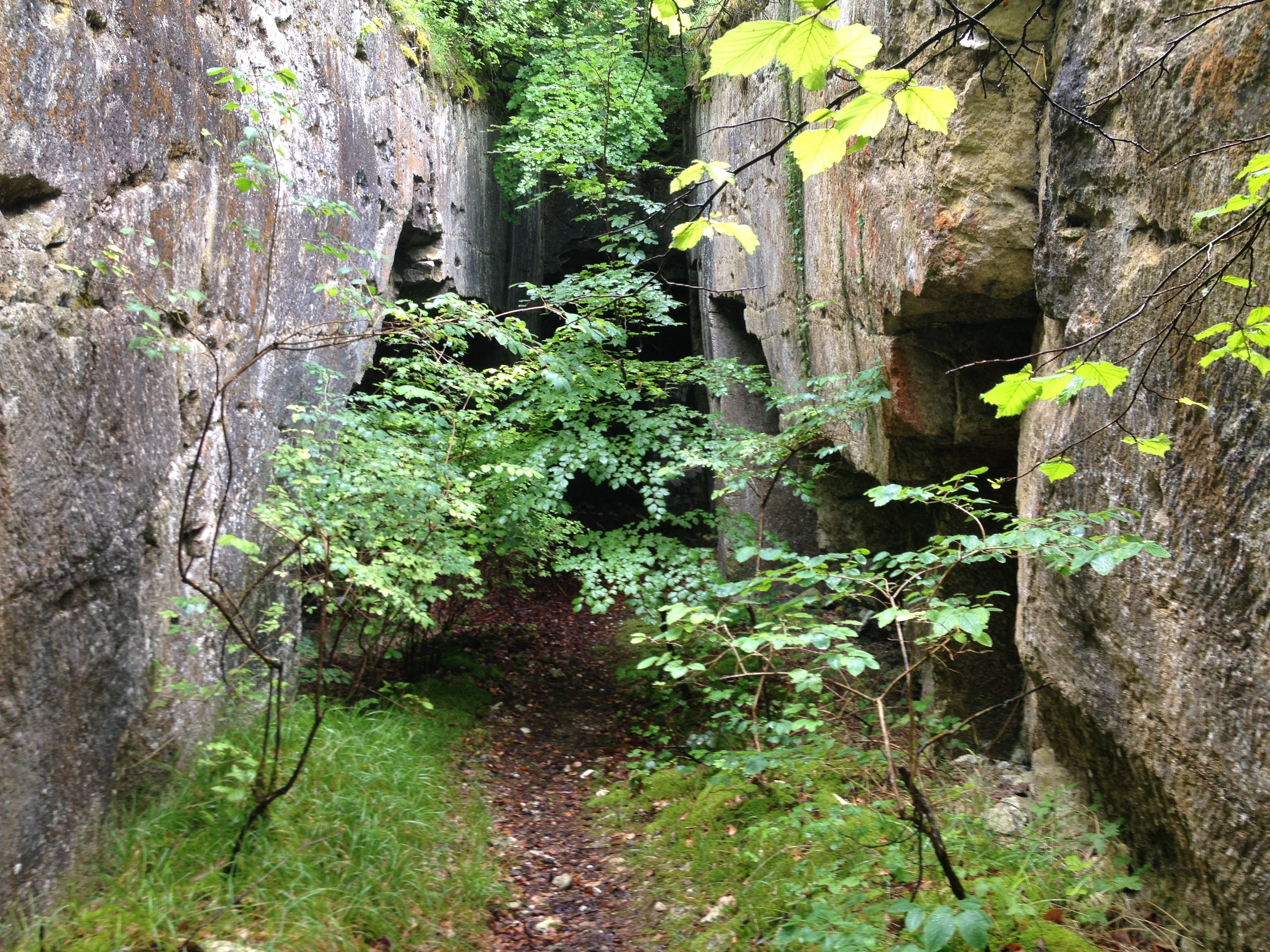 Carrière de la Montagne des Allouettes, à Sougères-en-Puisaye.